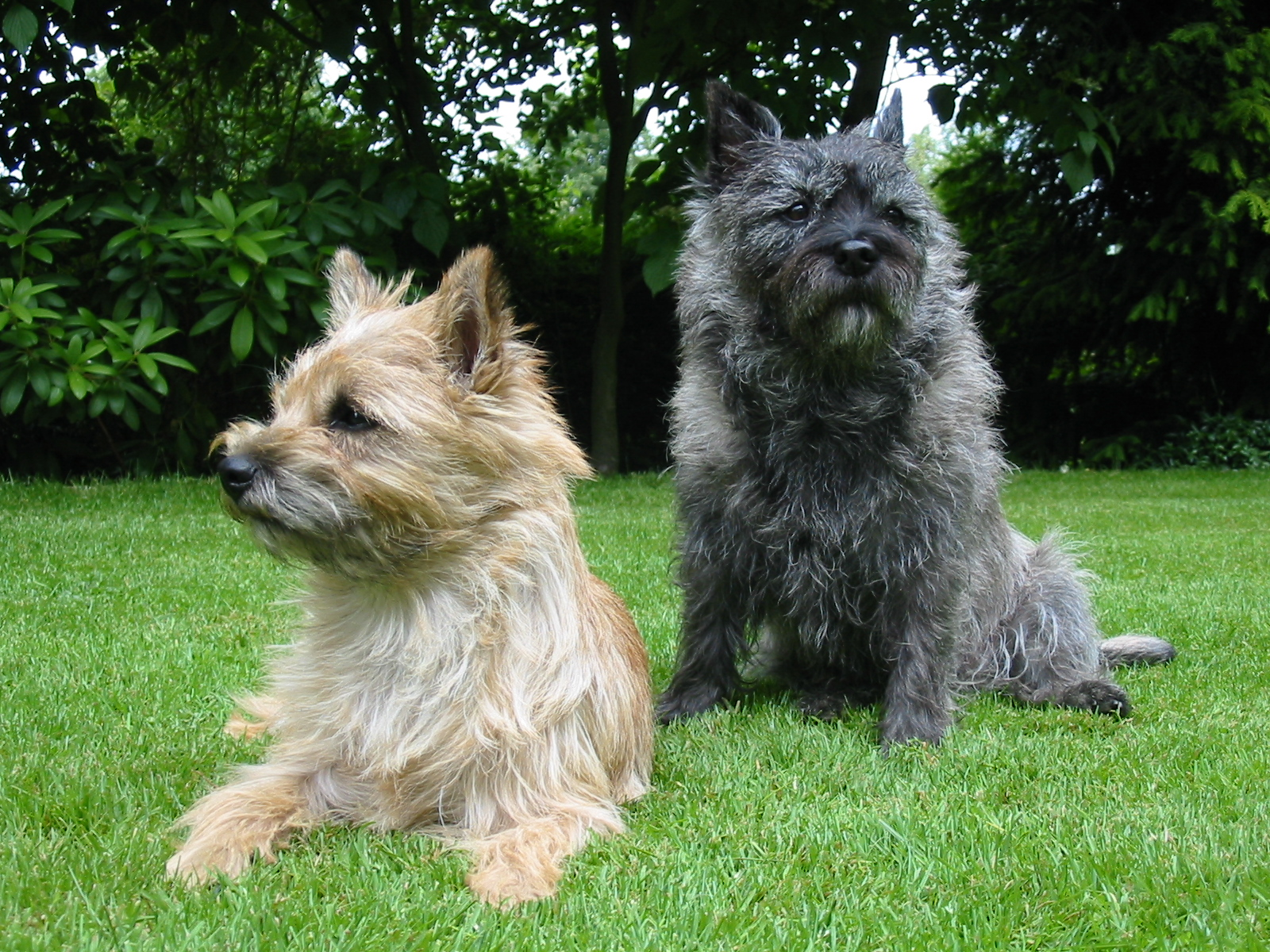 Cairn Terrier Nimbu und Pongo aus der Zucht Allerlei Rauh/Geroda